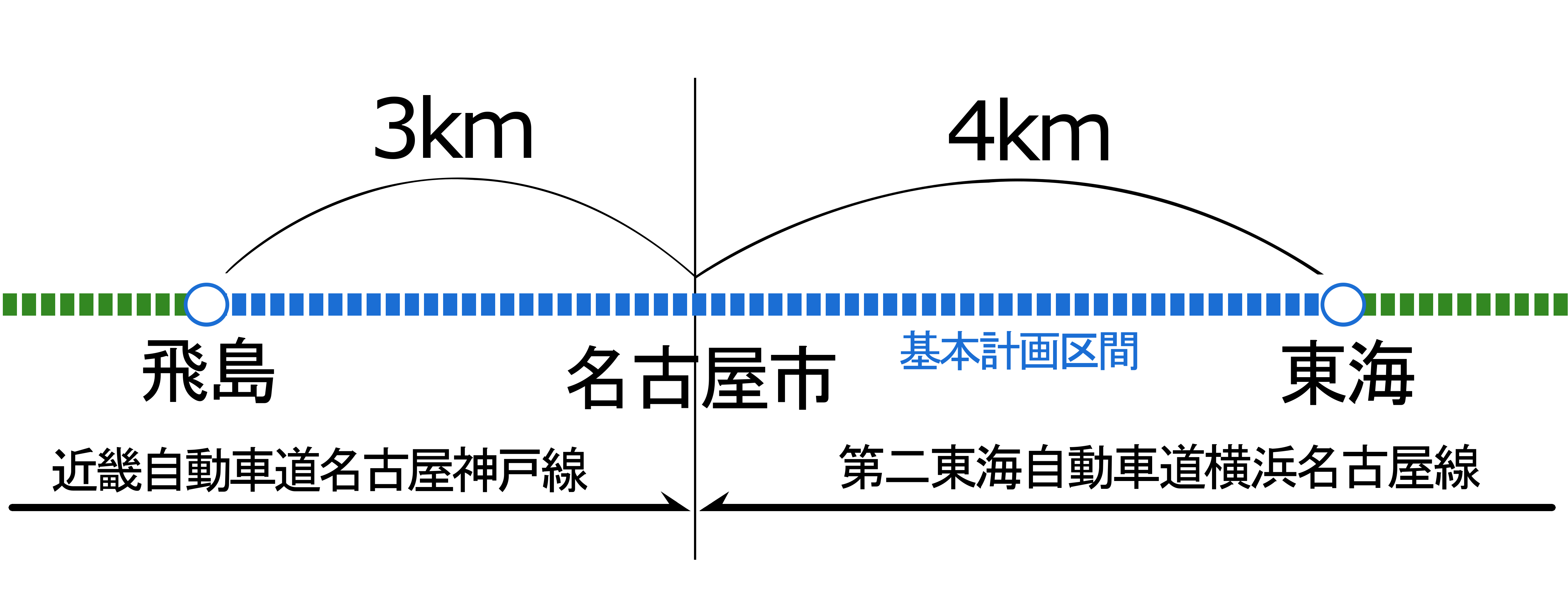 1997年基本計画区間に追加された東海 - 飛島間の路線割り振り図。典拠:『高速道路と自動車』公益財団法人高速道路調査会、1997年2月、32 - 37頁。